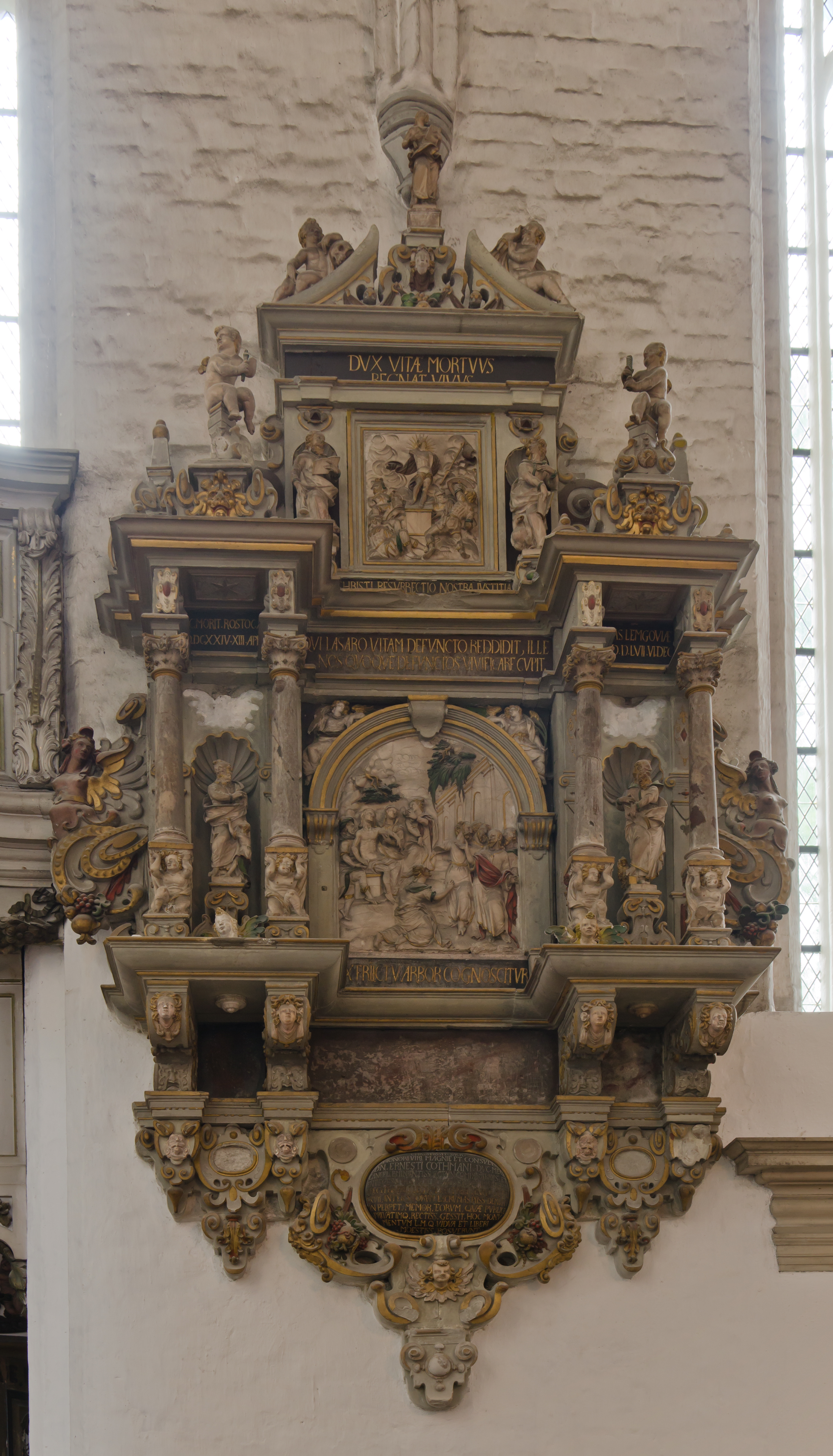 Rostock St.Marien Epitaph Ernst Cothmann